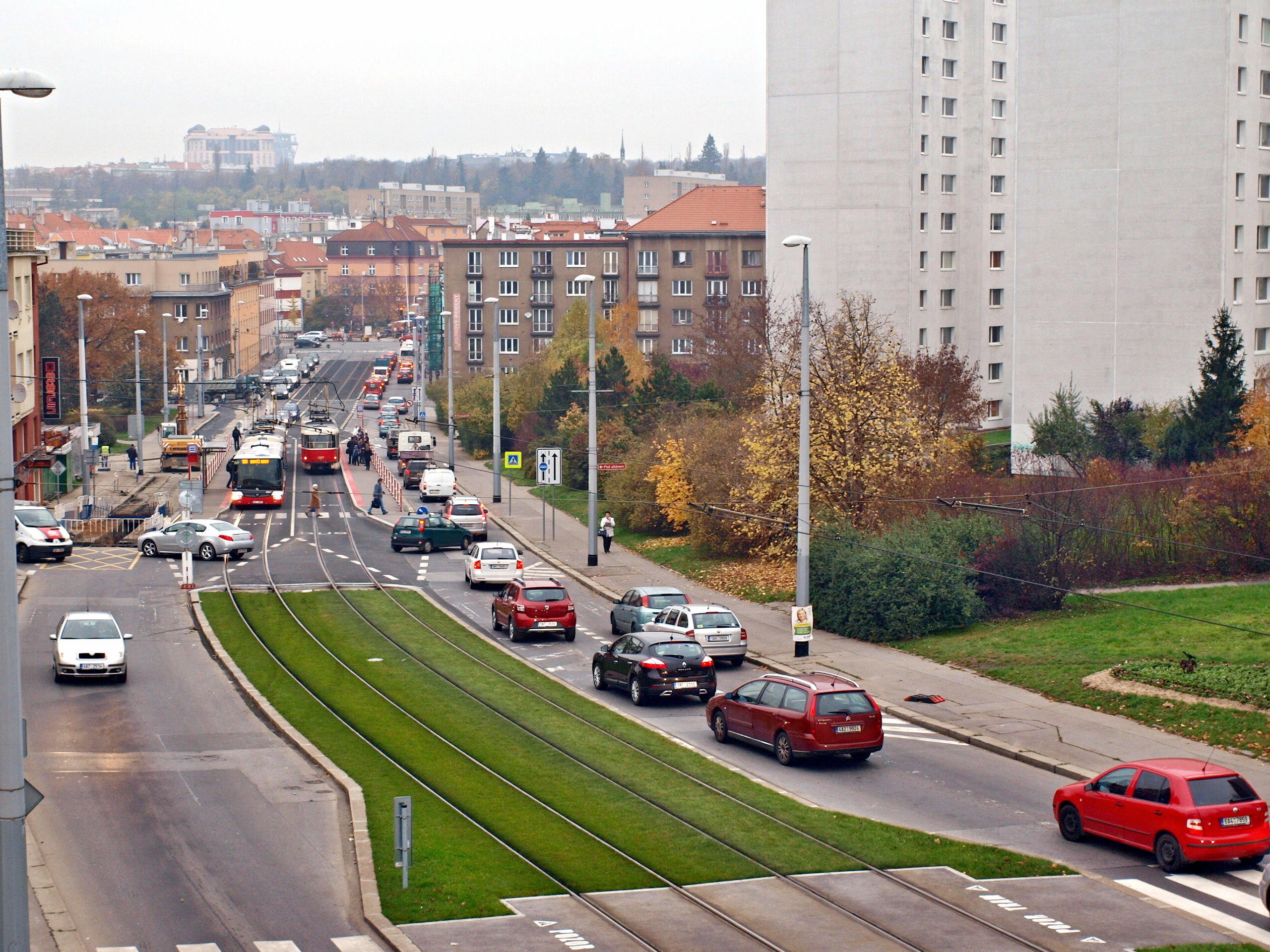 Ulice Průběžná v Praze Strašnicích